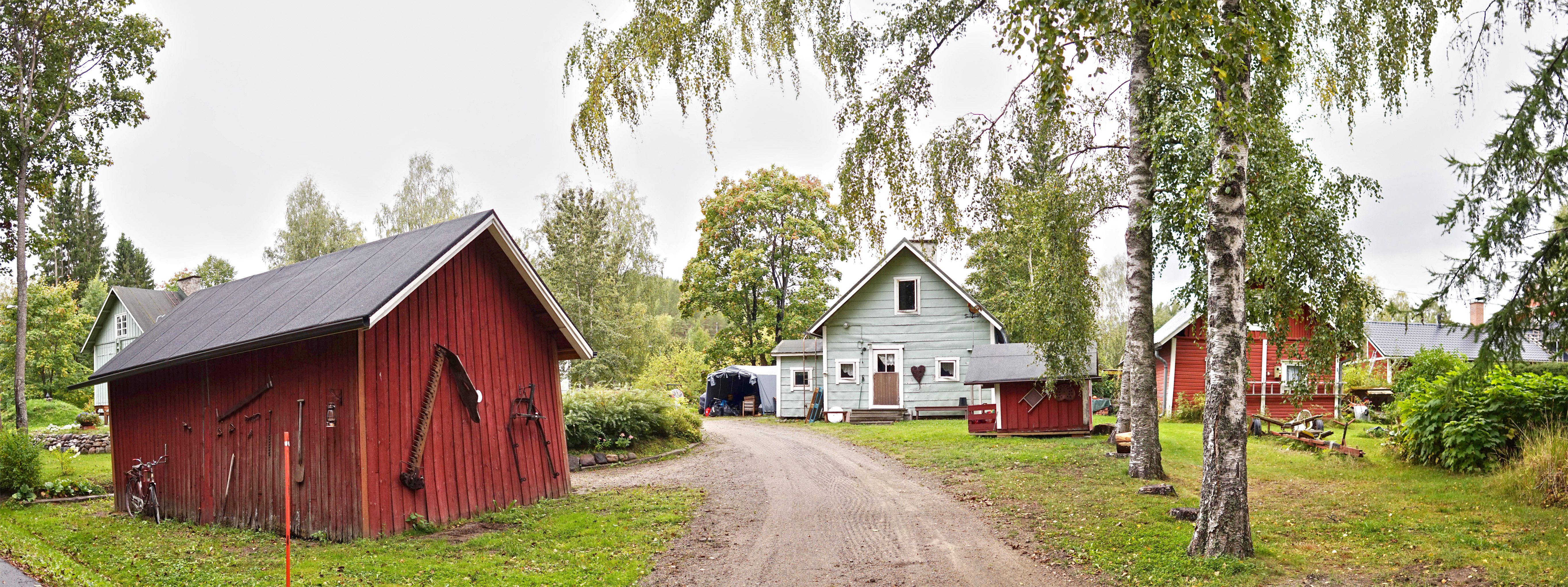 Haikka, Muuratsalo, Jyväskylä. Näkymä Saaritieltä.